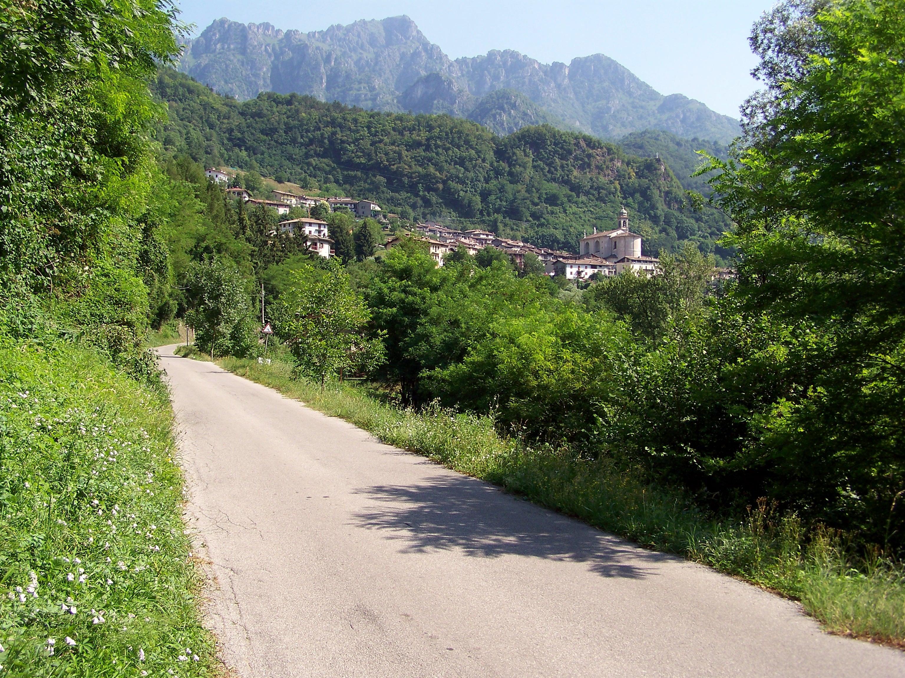 Via del Tram a Lavenone. Si tratta del percorso abbandonato in sede propria della tranvia Brescia – Idro che aggirava a valle l'abitato del paese valsabbino. Sullo sfondo, la parrocchiale di Lavenone.